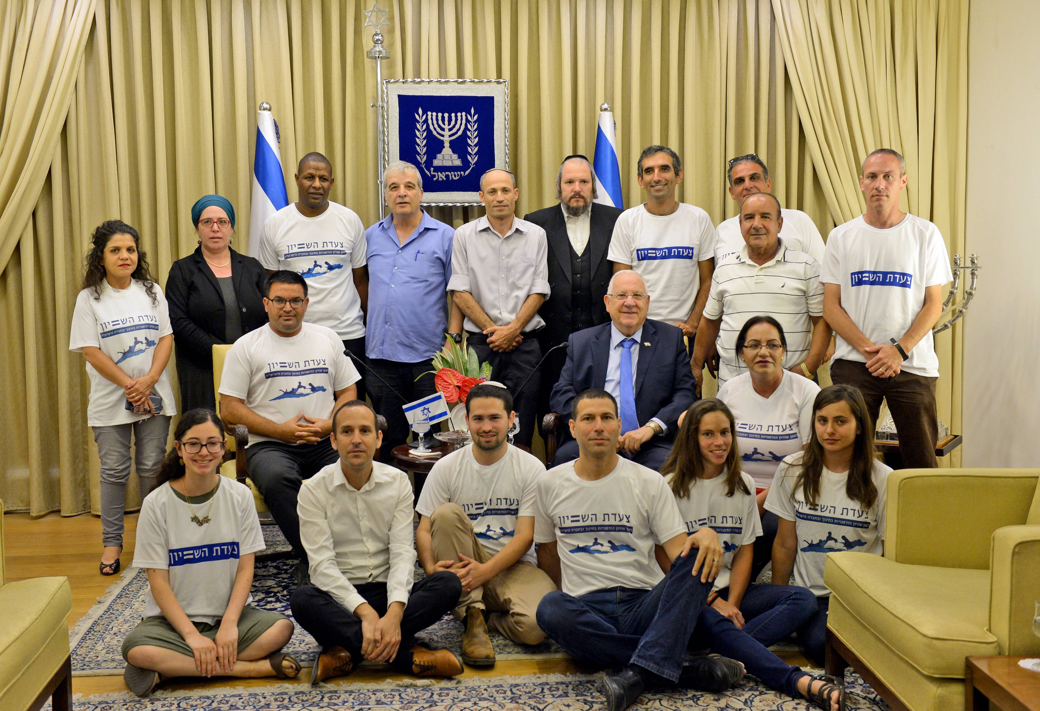 נשיא מדינת ישראל ראובן ריבלין נפגש עם מובילי השיוויון בחינוך ברווחה בראשות ראש העיר ירוחם מיכאל ביטון